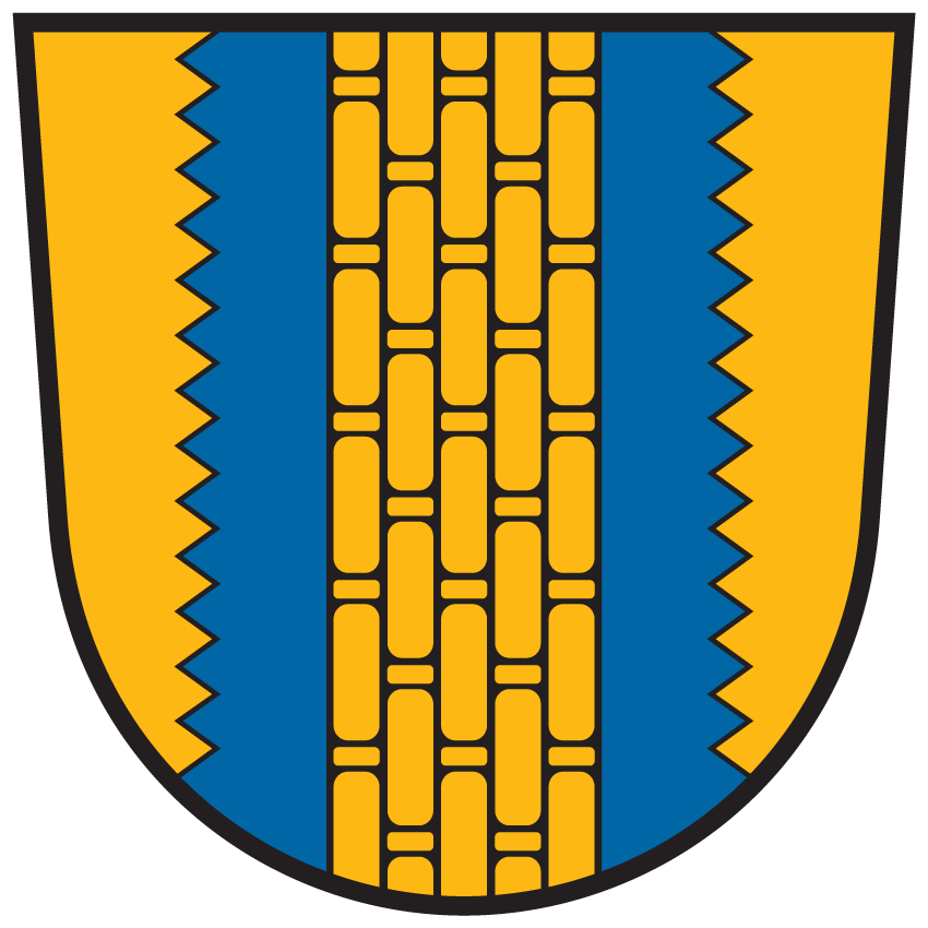 Wappen von Ludmannsdorf